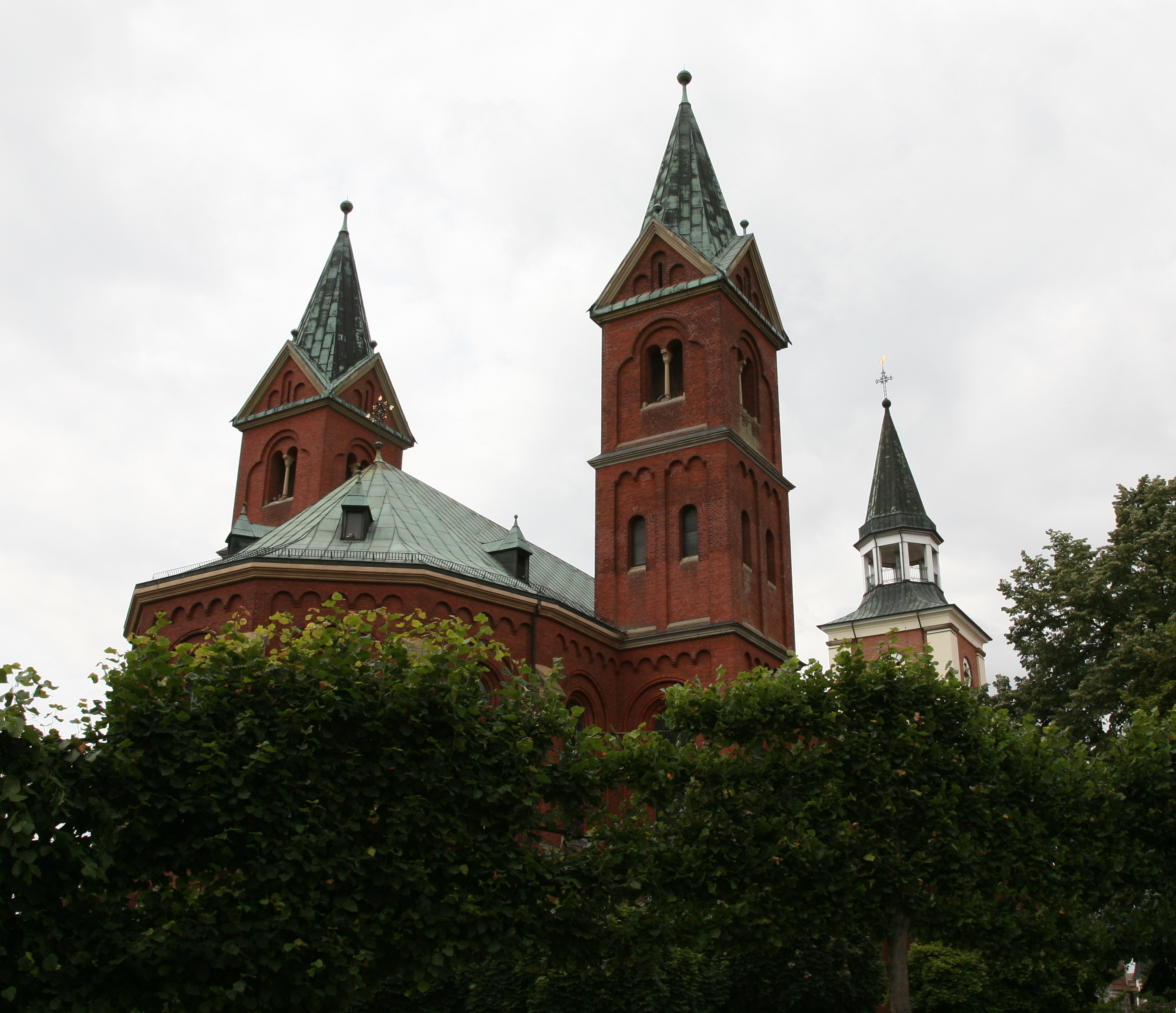 St. Gertrud Kirche is a church in Lohne (Oldenburg)